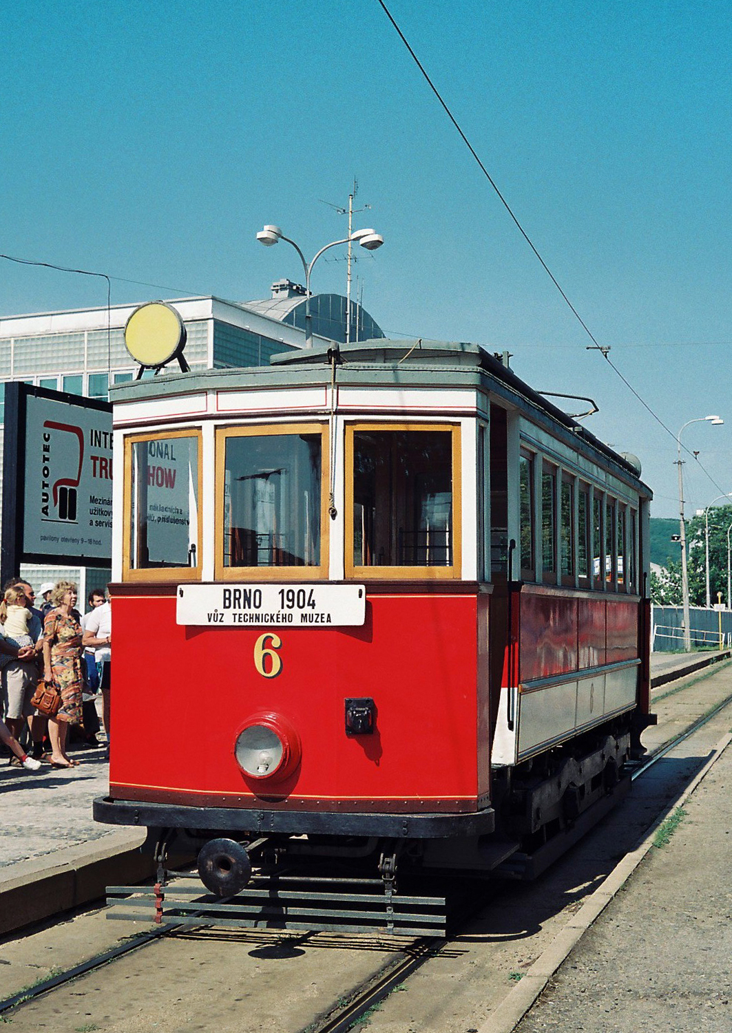 Tramvaj evidenčního čísla 6 na dopravní nostalgii v roce 2000 – archiv Jiřího Vobeckého